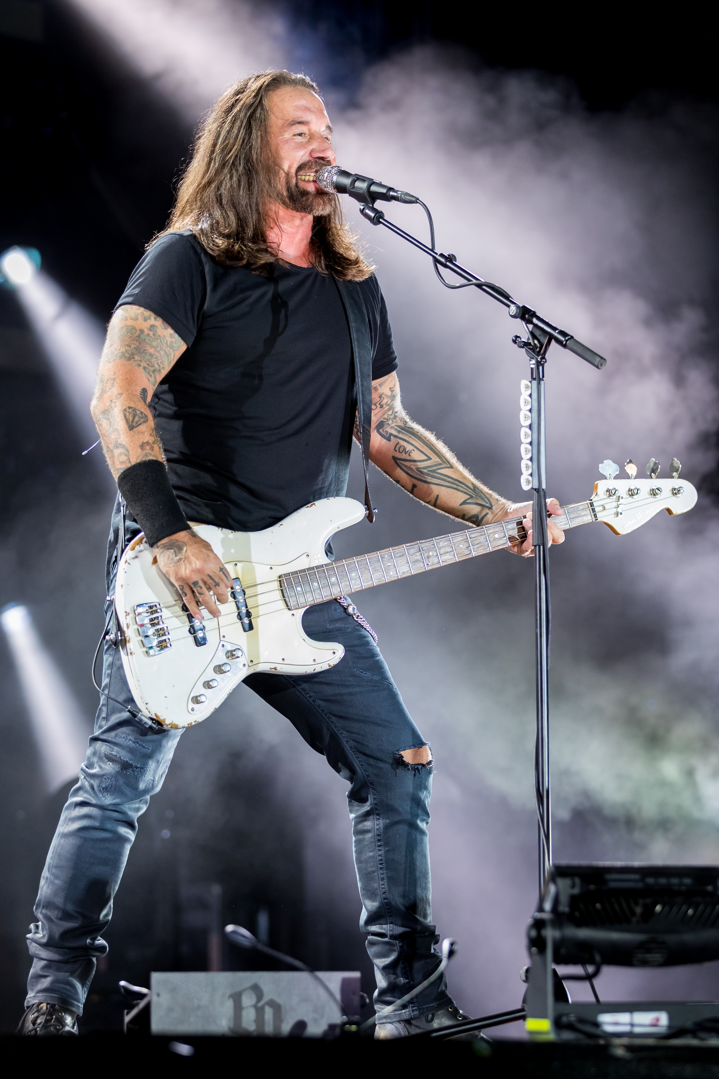 Böhse Onkelz during Werner Rennen at Flugplatz Hartenholm, Hasenmoor, Schleswig-Holstein, Germany on 2019-08-31, Photo: Sven Mandel